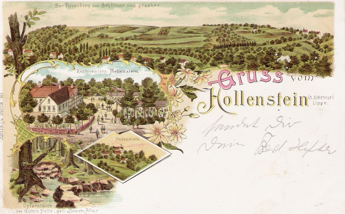 Deutschland (D) - Nordrhein-Westfalen (NW) - Kreis Lippe (LIP) - Bad Salzuflen: Hollenstein, Ansichtskarte ~ 1900